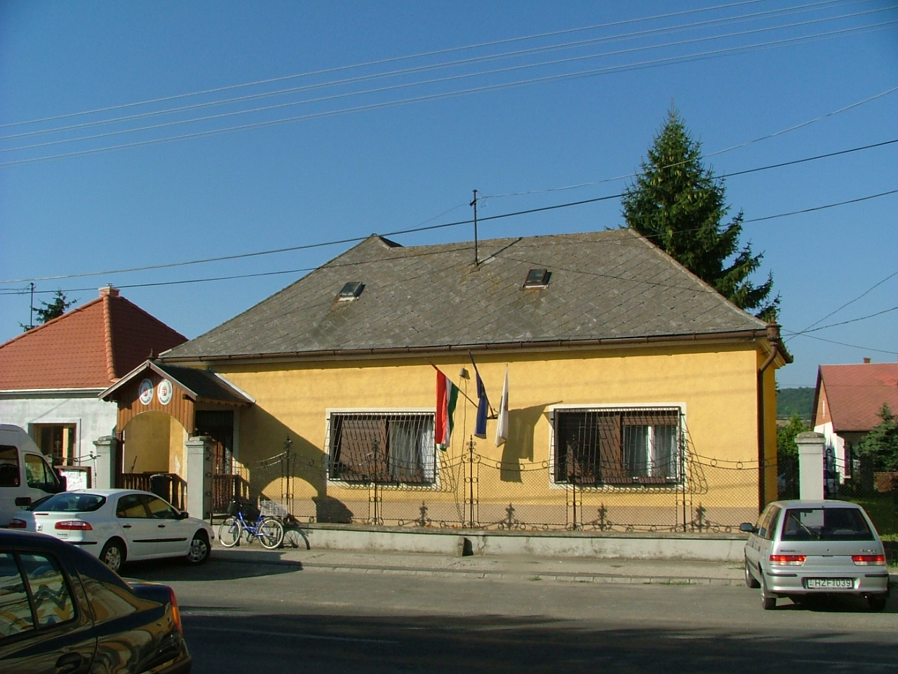 Pázmándfalui községháza